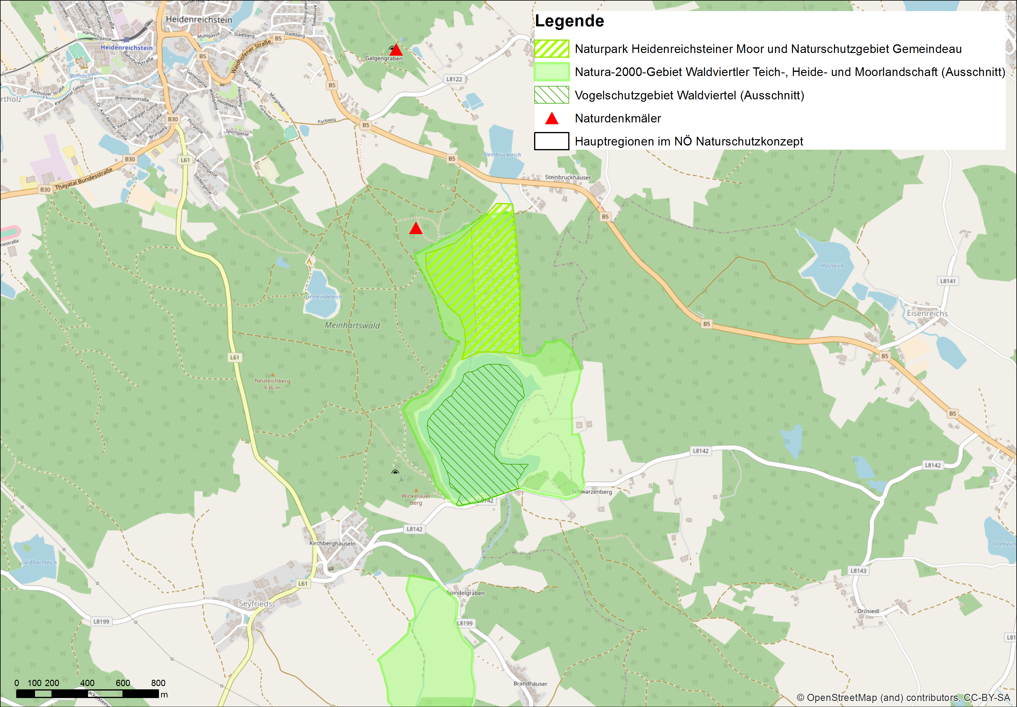 Naturschutzfachliche Festlegungen im Naturpark Heidenreichsteiner Moor/Naturschutzgebiet Gemeindeau